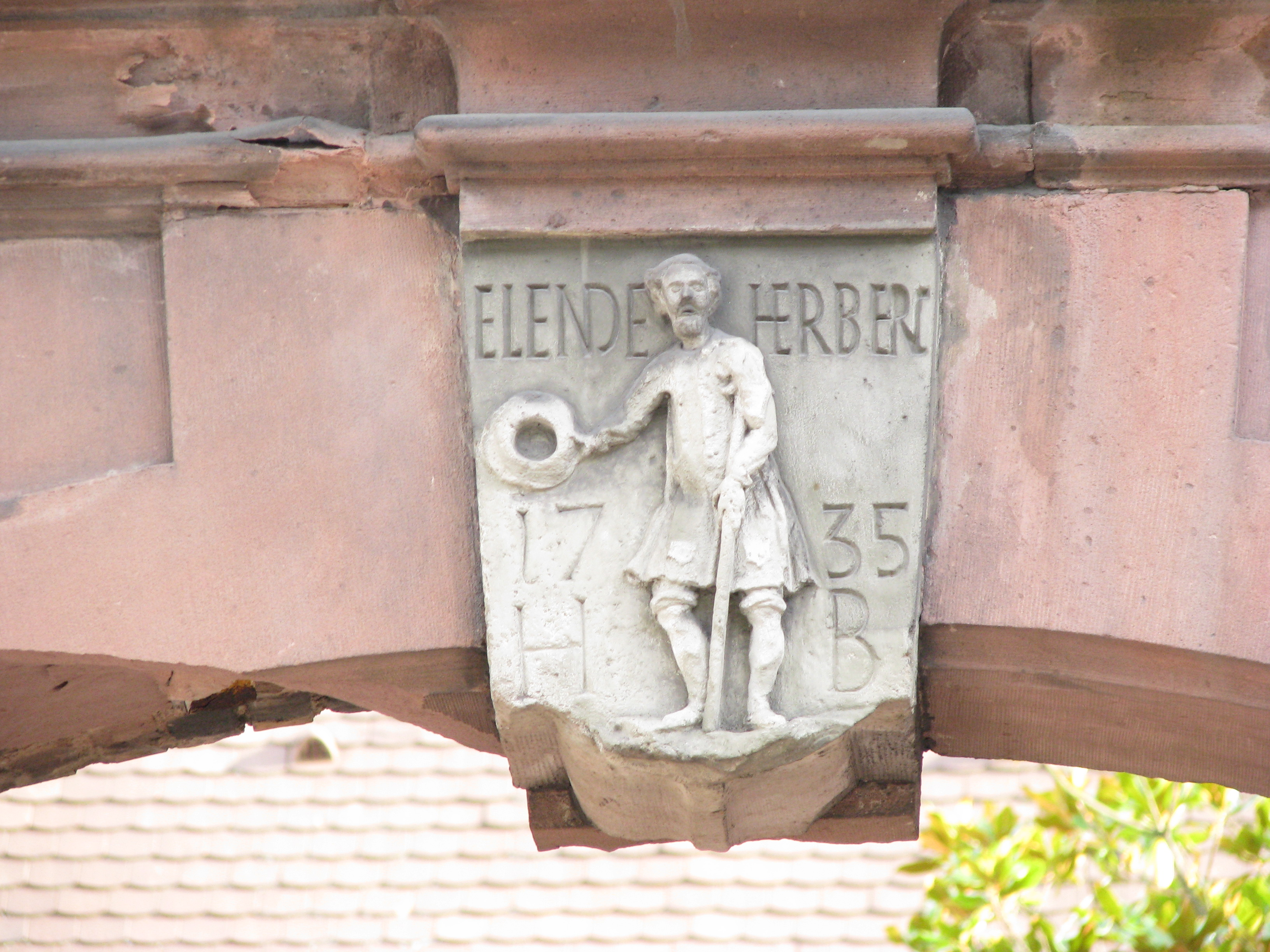 Schlussstein am Hoftor des ehemaligen St.-Anna-Hospitals in der Plöck, Heidelberg